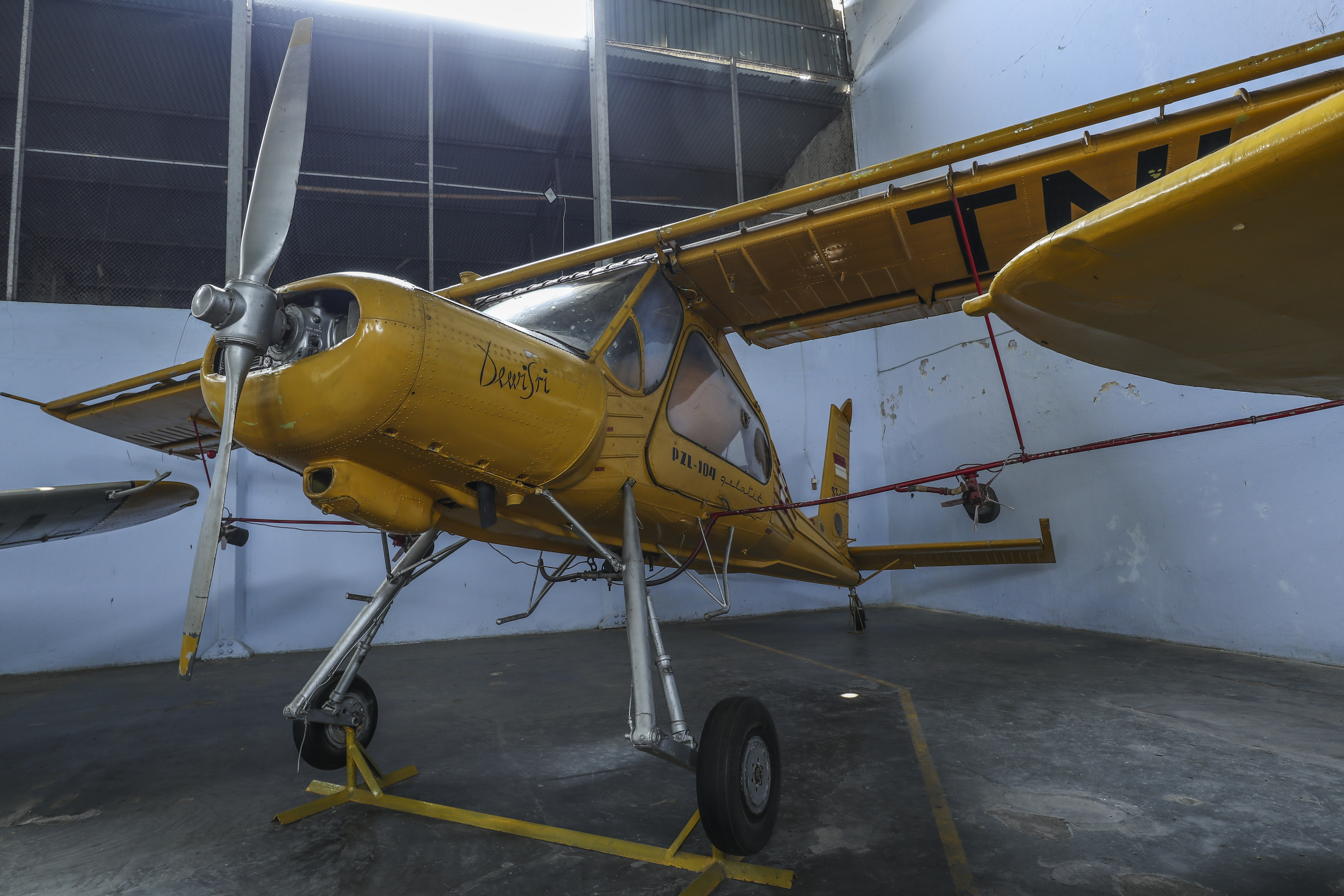 Pesawat PZL Gelatik, TNI AU